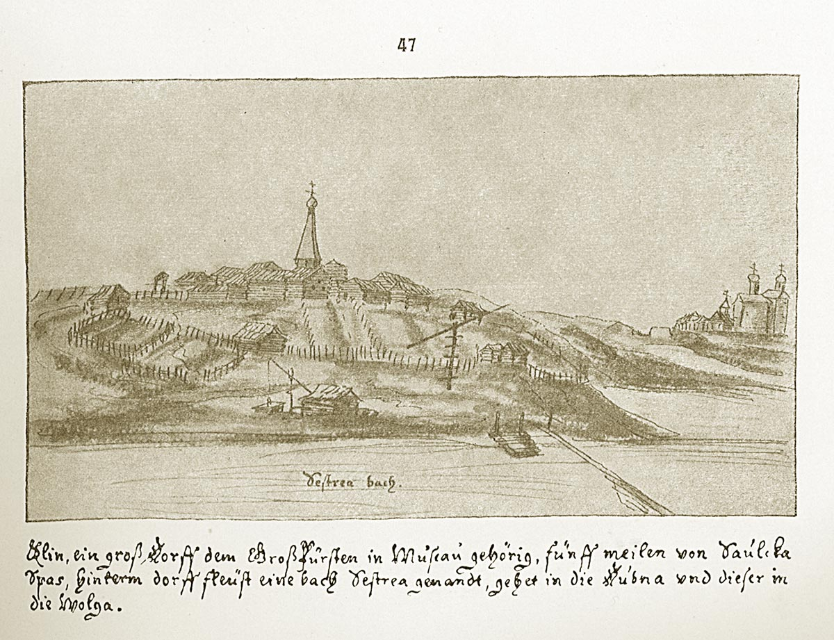 Клин